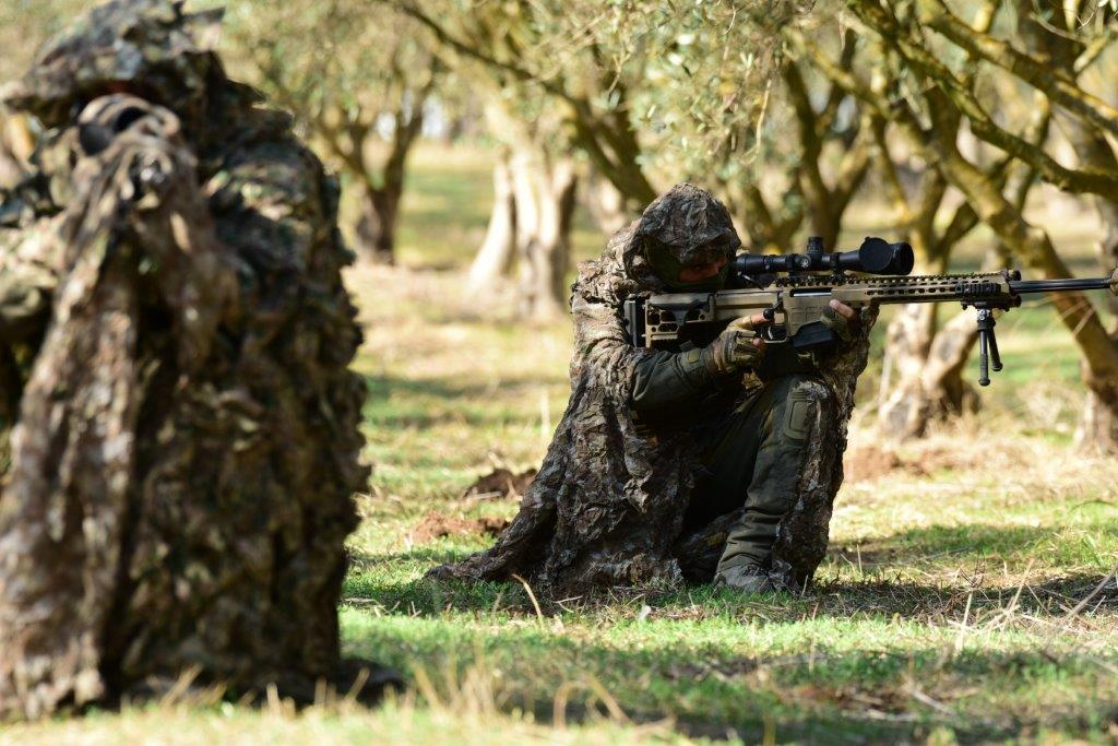 תרגיל מערך העומק והמיוחדים באי כרתים שביוון. Depicted place: Crete